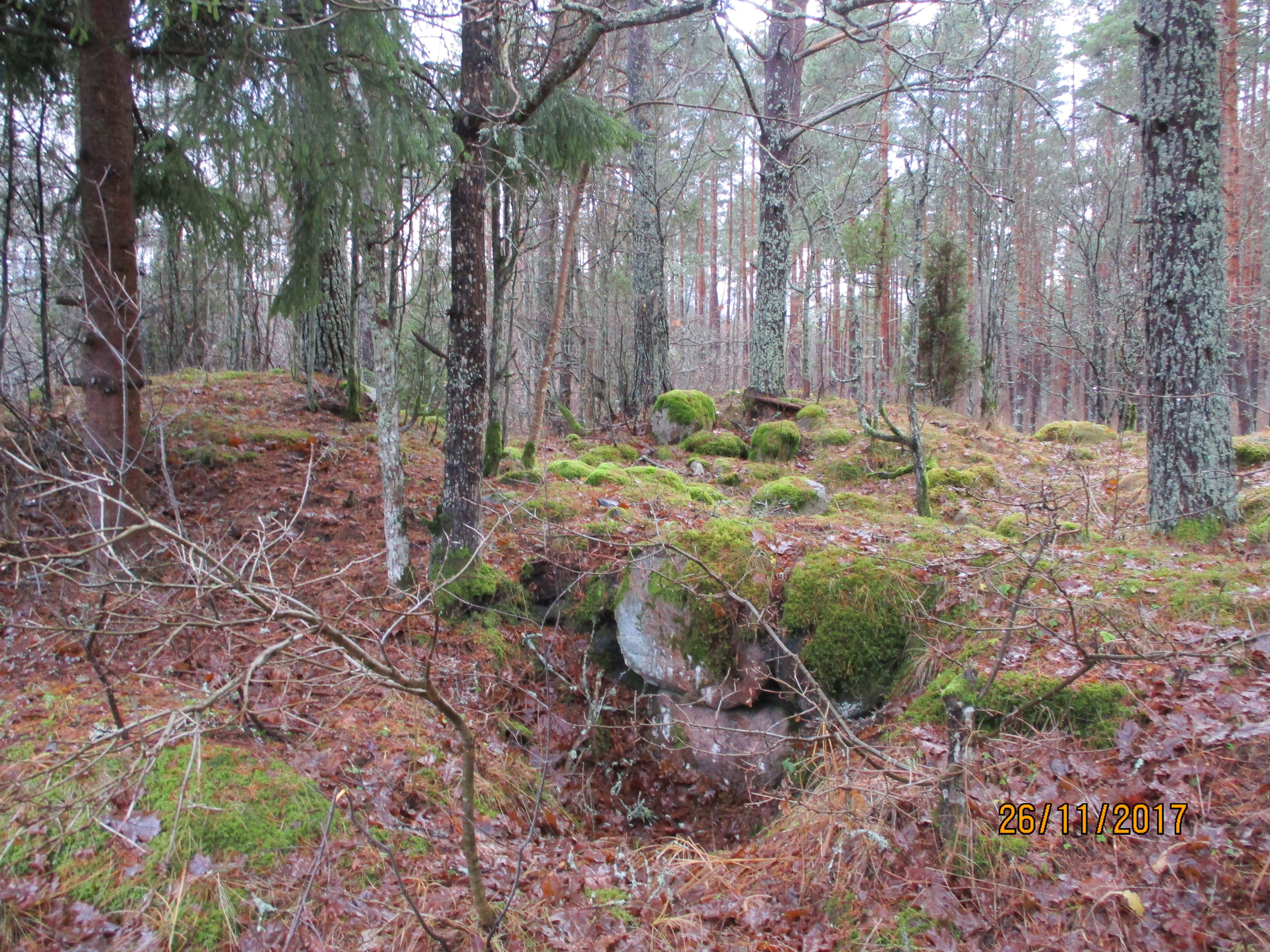 Linnuse keskel kastelli läänepoolse kaitsemüüri vastu toetus ilmselt valdustorn. Vaade torni vundamendile idast.